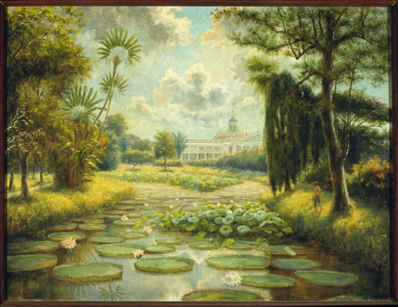 Olieverfschilderij. Op de achtergrond het paleis van de Gouverneur-Generaal.. De Plantentuin te Buitenzorg